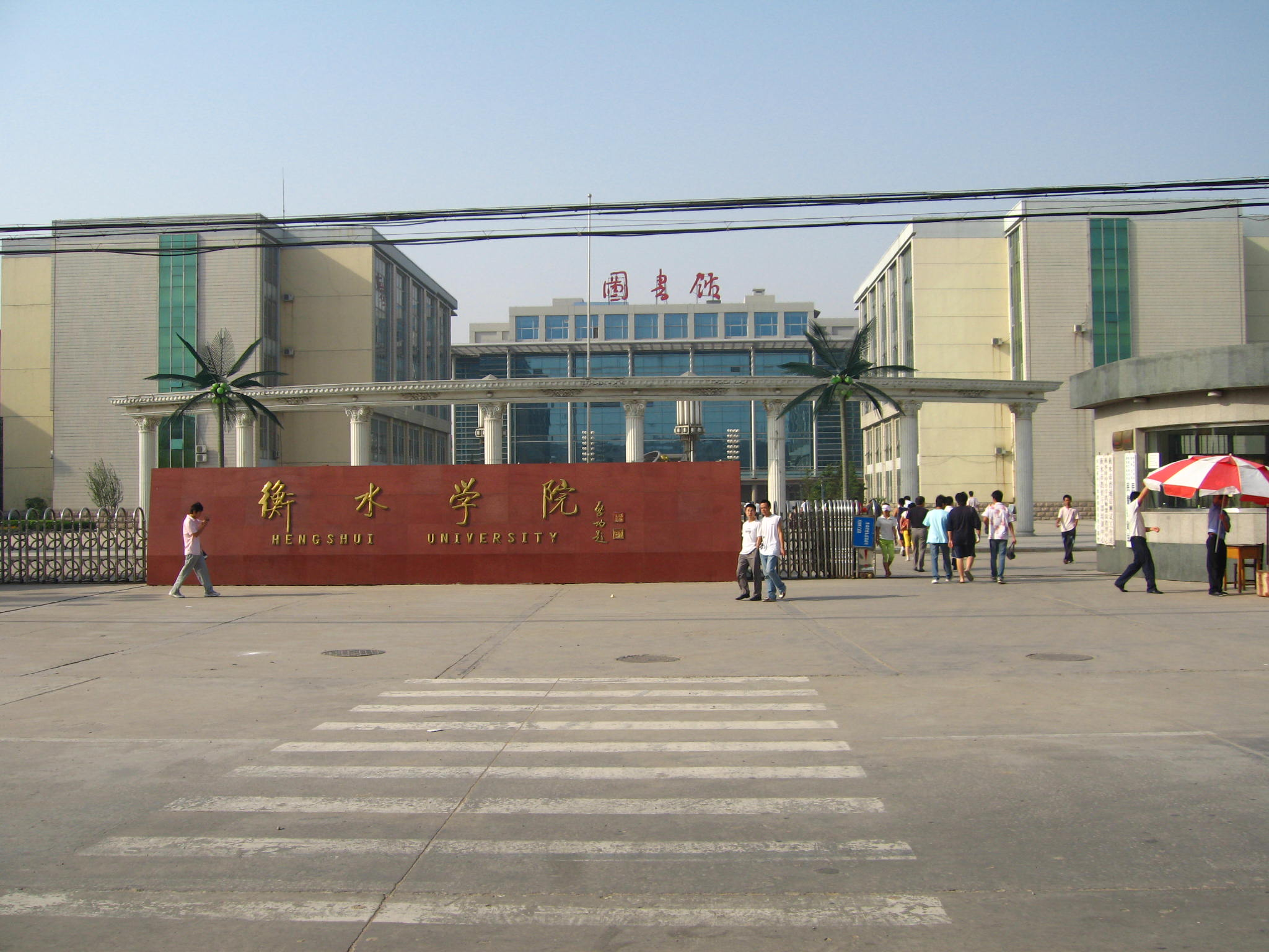 Hengshui University. Norsk (bokmål): Ingangspartiet til Universitetet i Hengshui.